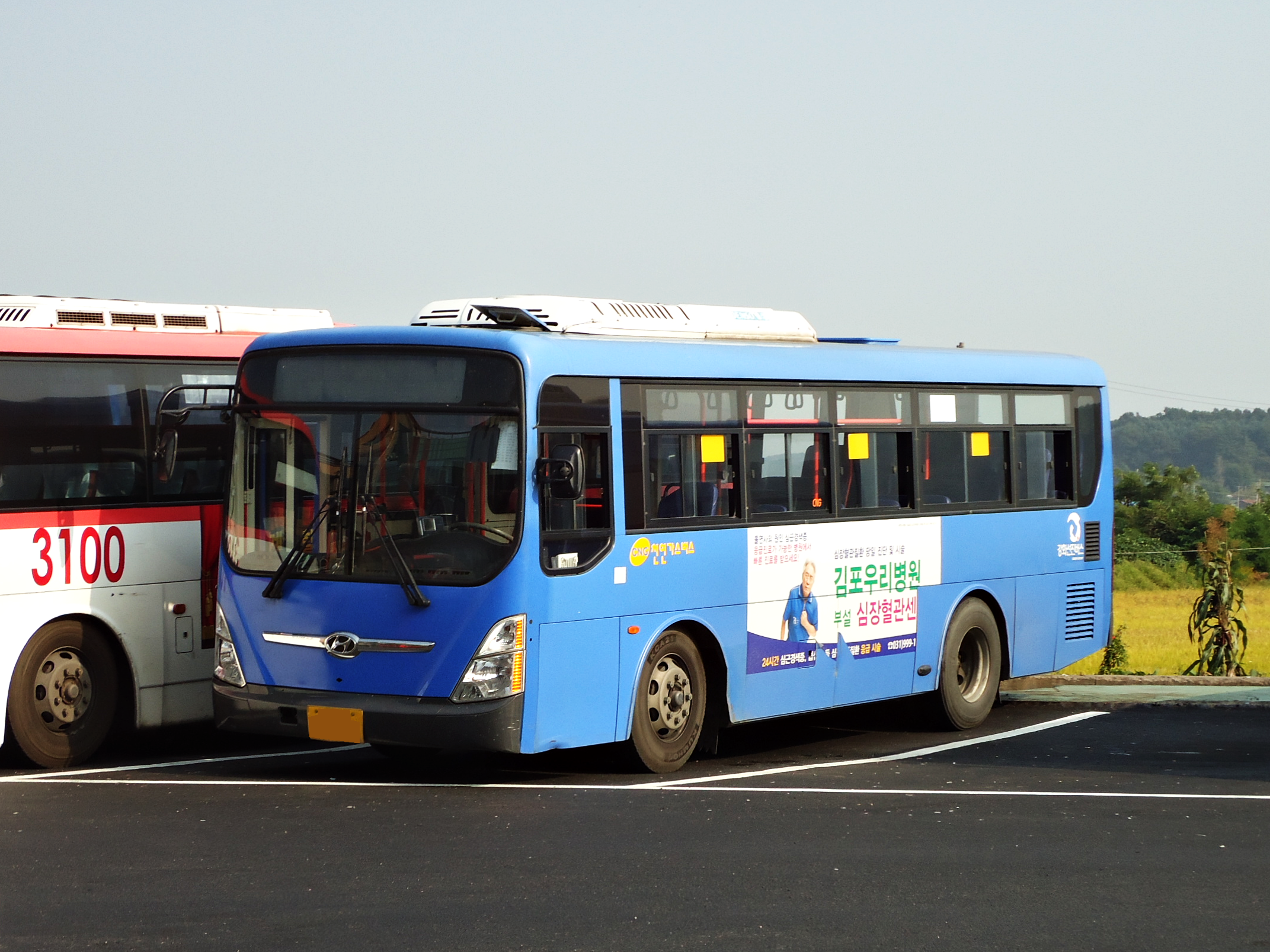 강화선진버스-강화군내버스 글로벌 900. 사진을 확대해보니 오른쪽 첫 번째 창이 통유리로 되어있어서 글로벌 900이라고 하겠습니다.